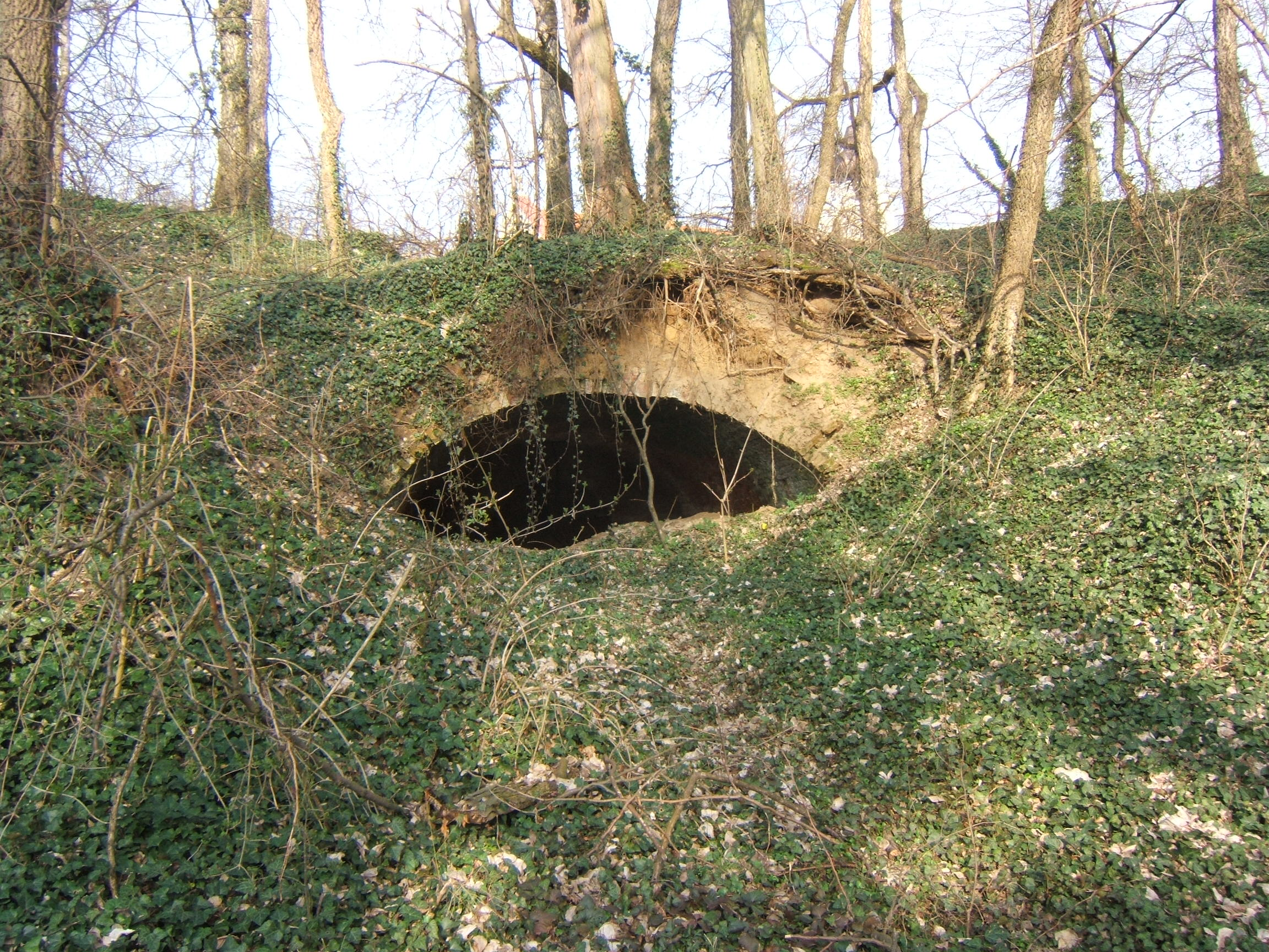 Babócsa, vármaradvány